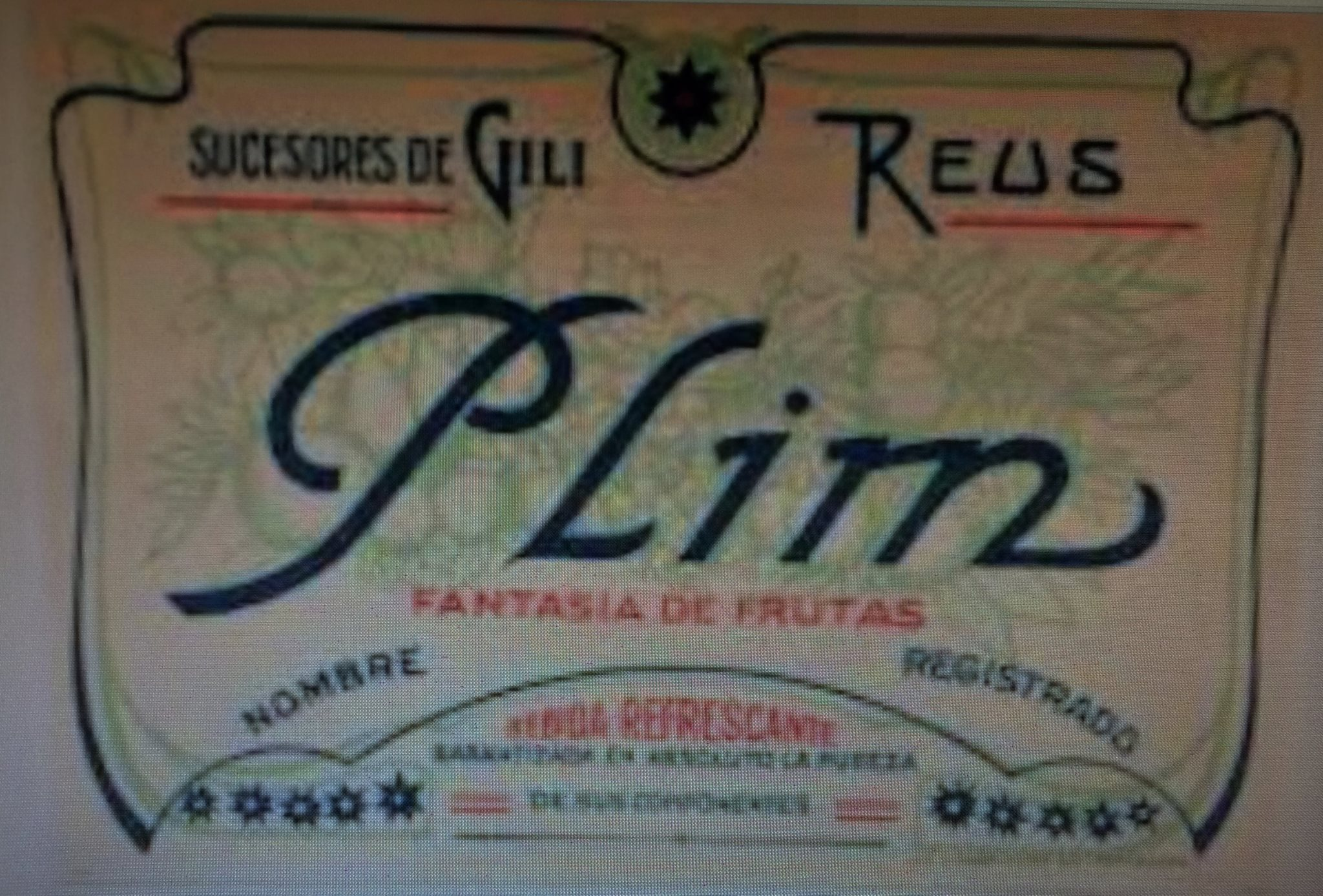 Etiqueta de Plim en una de les primeres botelles de la marca